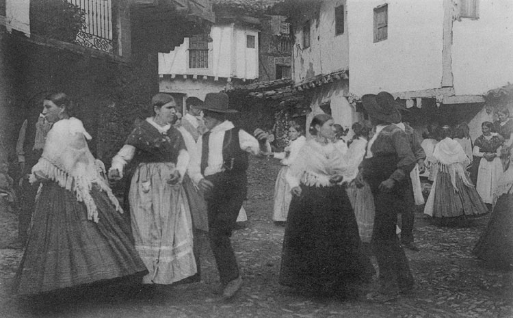 Baile - Guisando (Ávila) - Fot. Wunderlich. Núm. 1924 - Postal 135 x 90 B/N